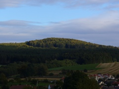 NPR Velký Špičák pohled od Jezdovic